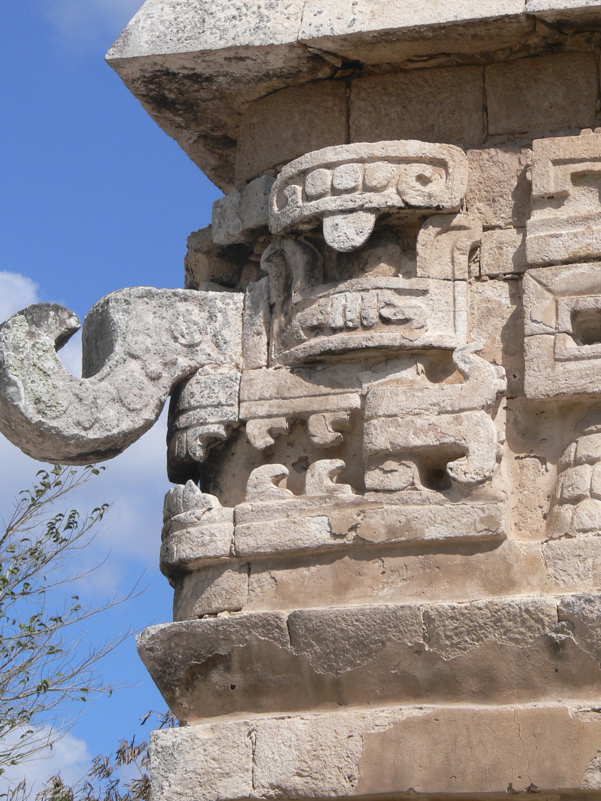 Chichen Itza. Temple La Iglesia: Relief